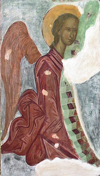 Mittelalterliches Fresko mit einem Engel aus dem bulgarischen HöhlenKloster Aladscha